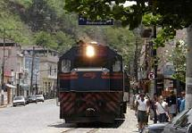 Ferrovia Centro Atlântica em Além Paraíba-MG